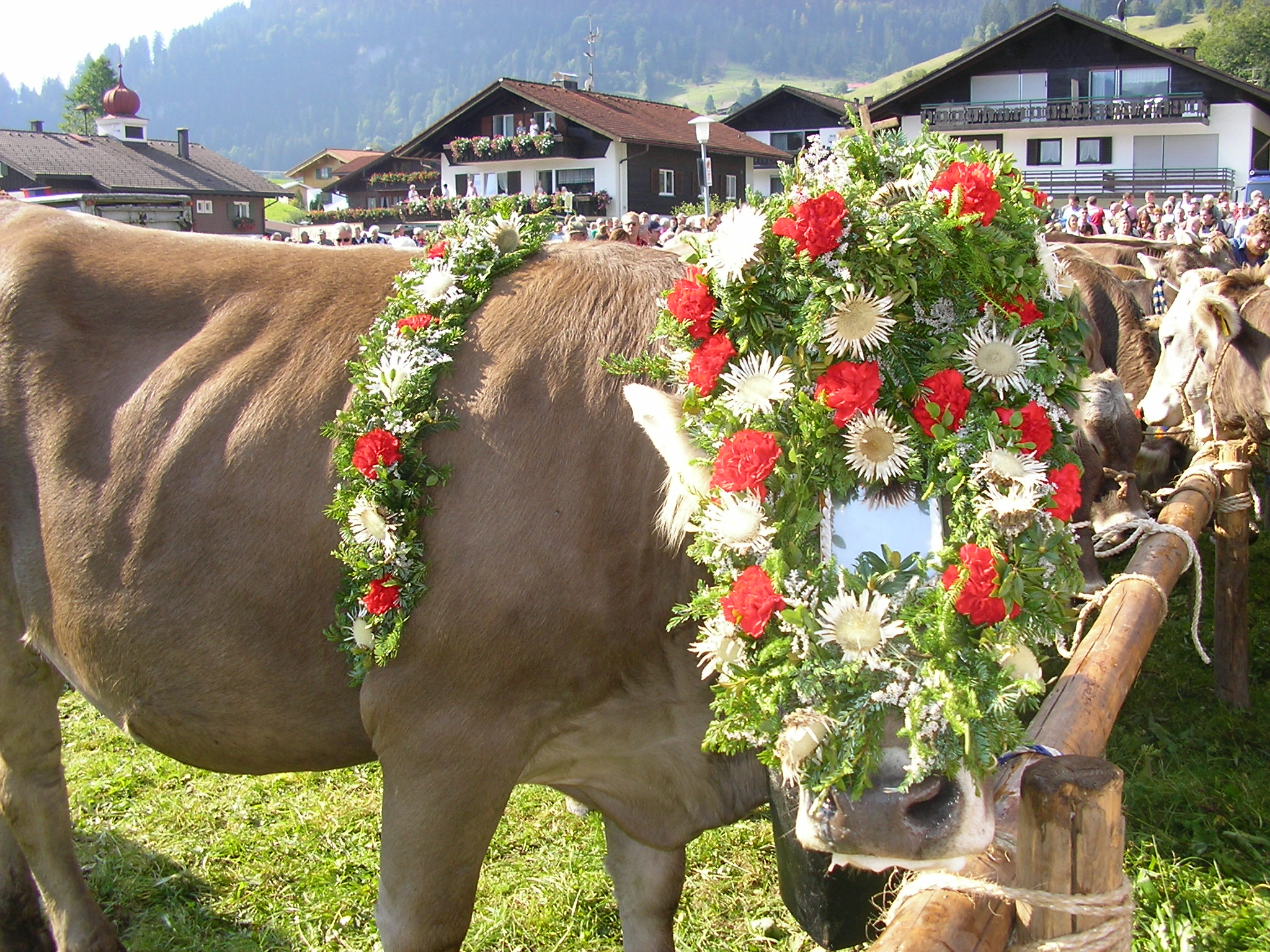 Eine Kuh mit Kranz, obermaiselsteiner Viehscheid 2005